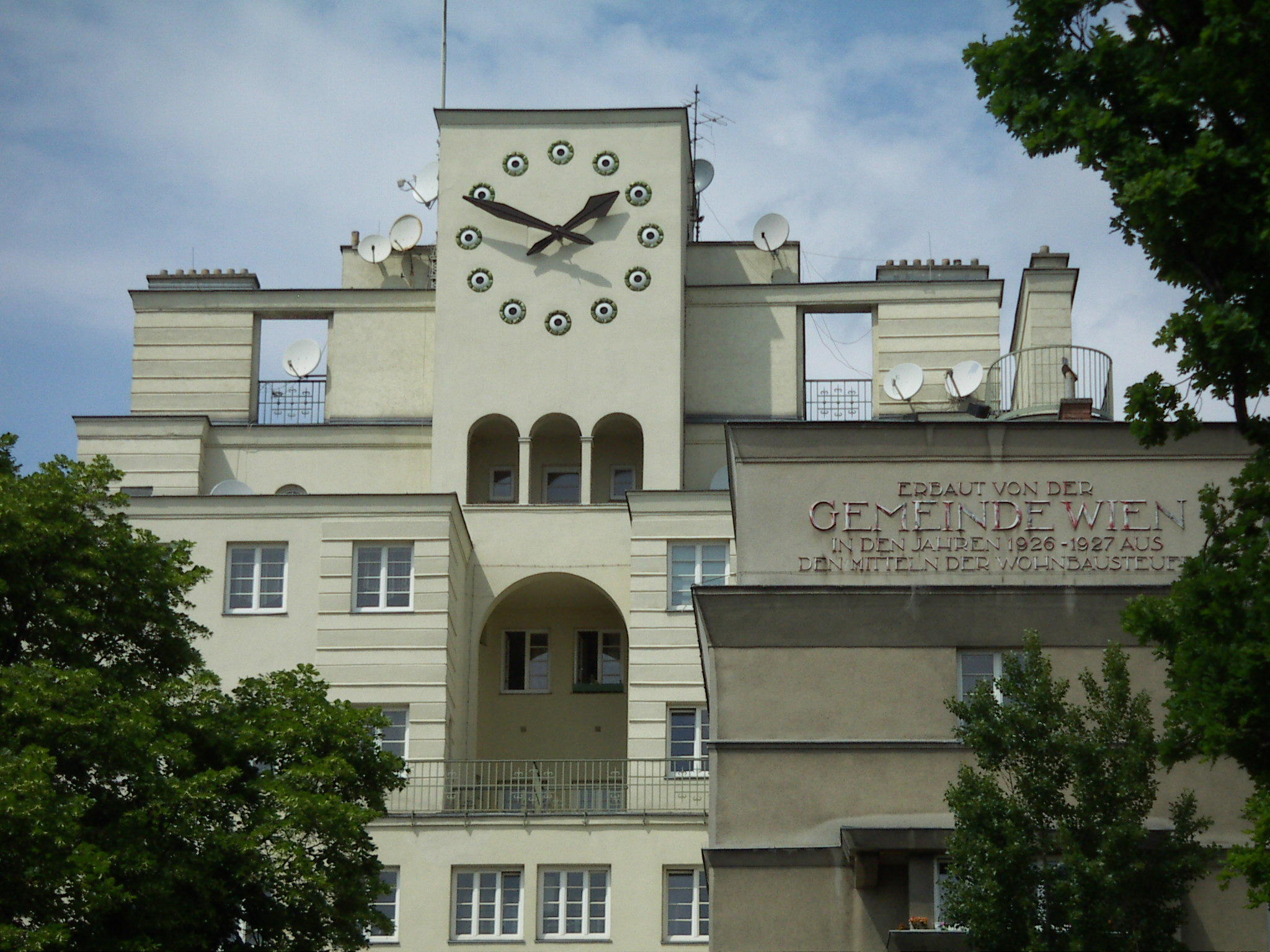 Karl-Seitz-Hof in Jedlesee Floridsdorf Wien, Architekt Hubert Gessner